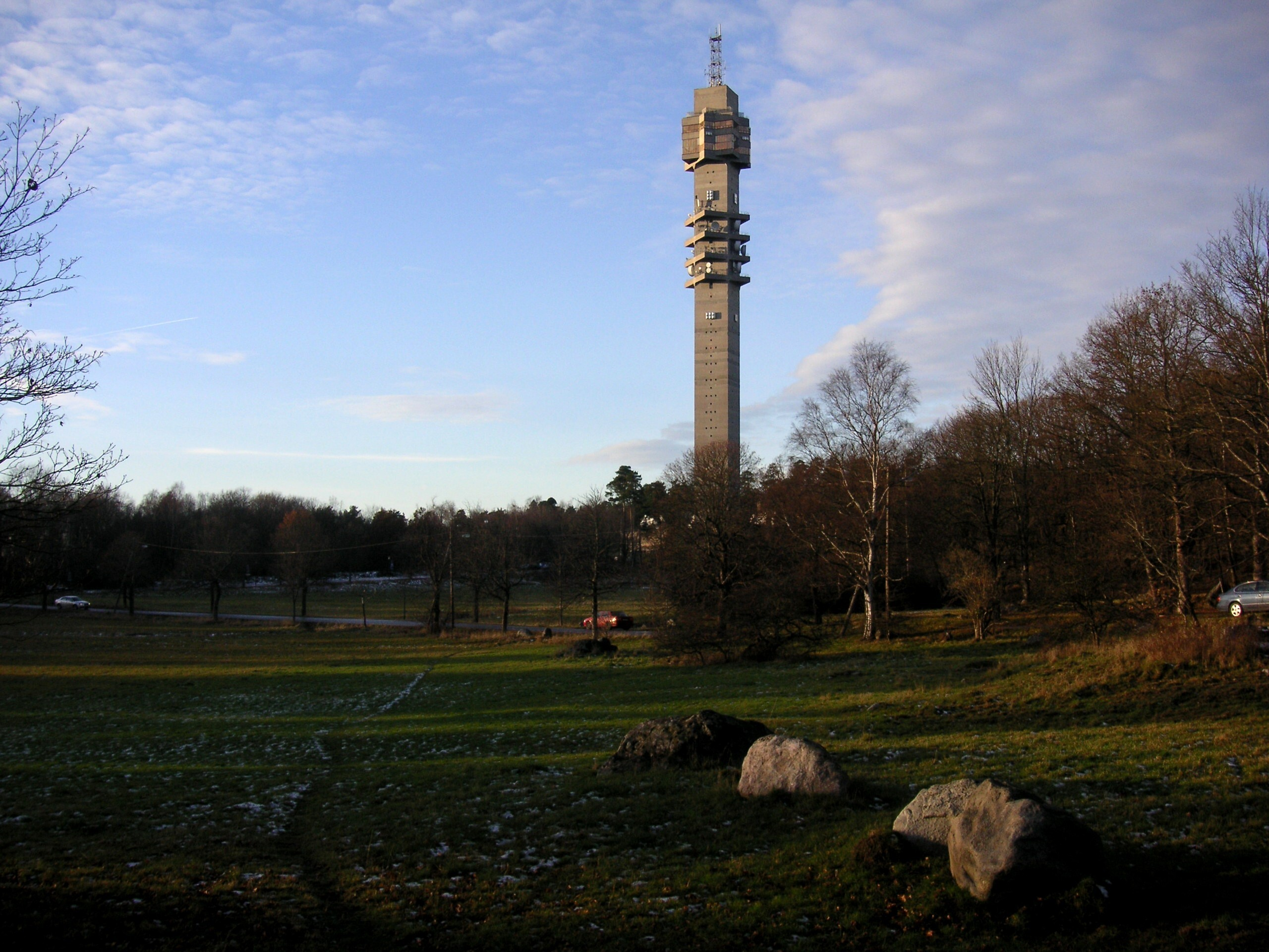 Kaknäs järnåldersgravfält på Gärdet i Stockholm